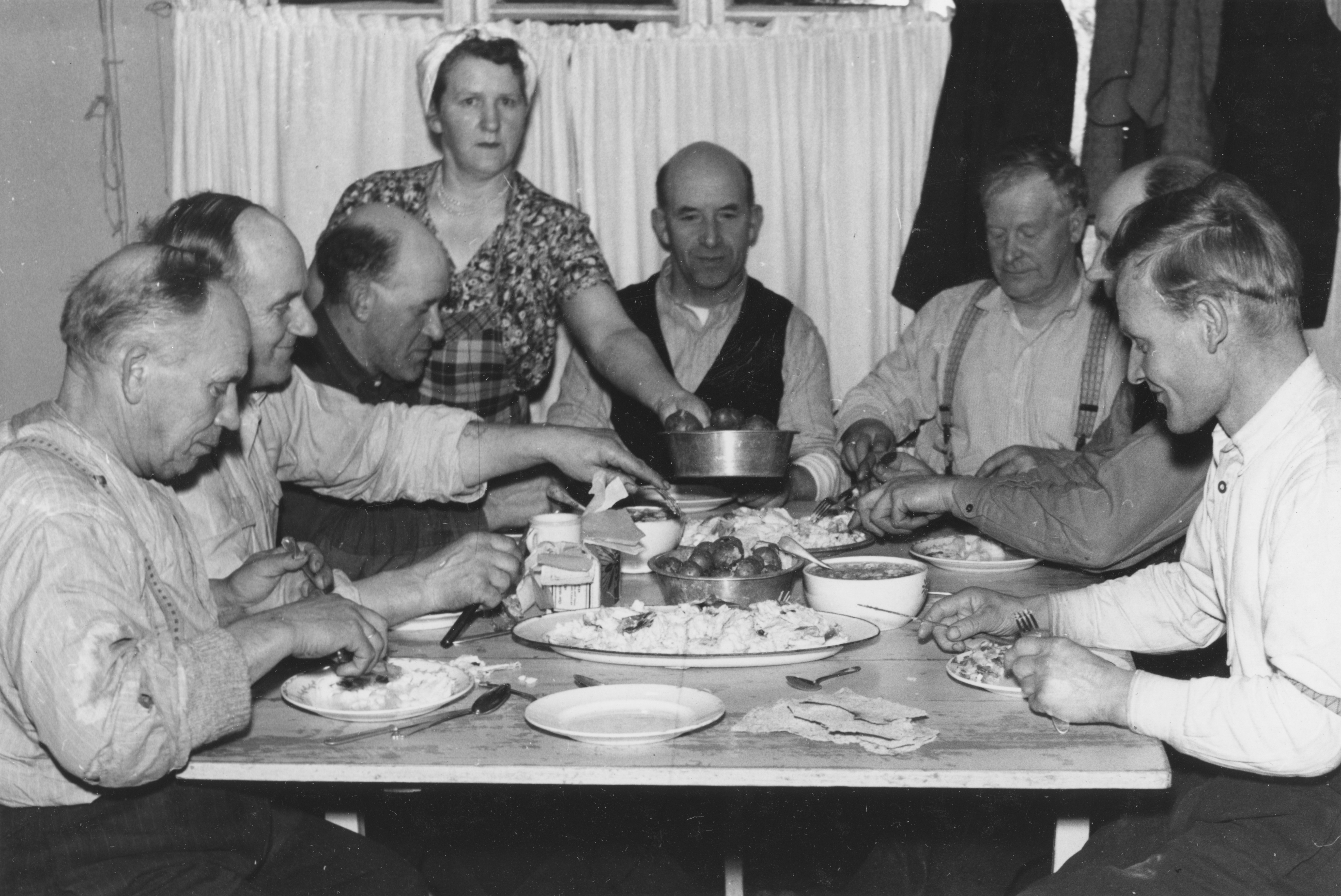 Bildet er hentet fra Nordlandsmuseet bildesamling etter Kanstad. Motivbeskrivelse: Matpause, 7 menn, kvinne, spisebord Nøkkelord: Yrkesspesialister, tilberedning av mat Måltider Spising og spiseredskaper Bord